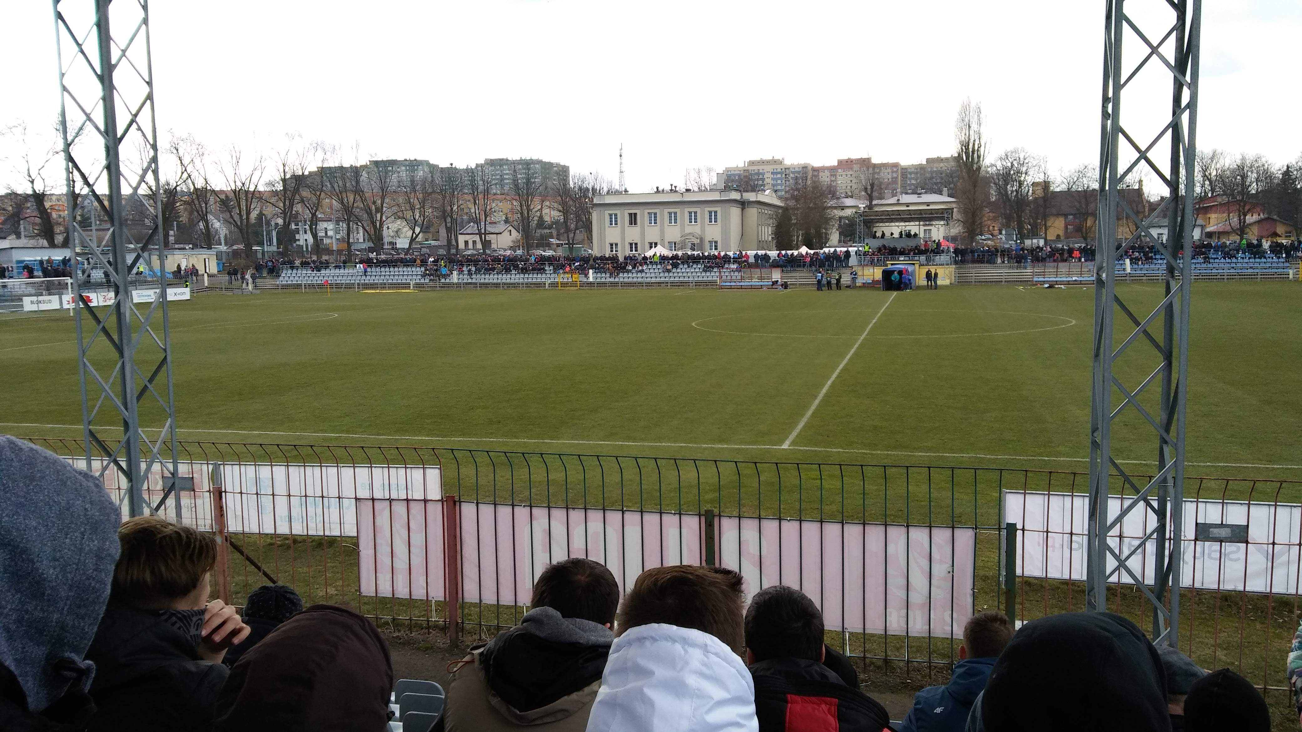 Stadion Rakowa podczas ligowych rozrywek